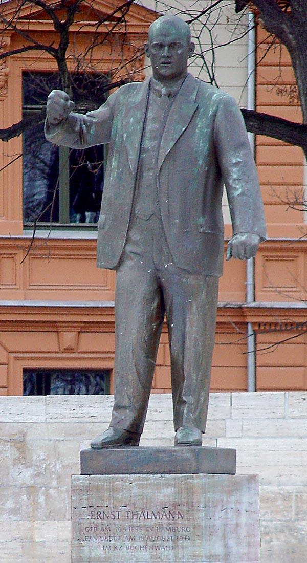 Ernst-Thälmann-Denkmal in Weimar